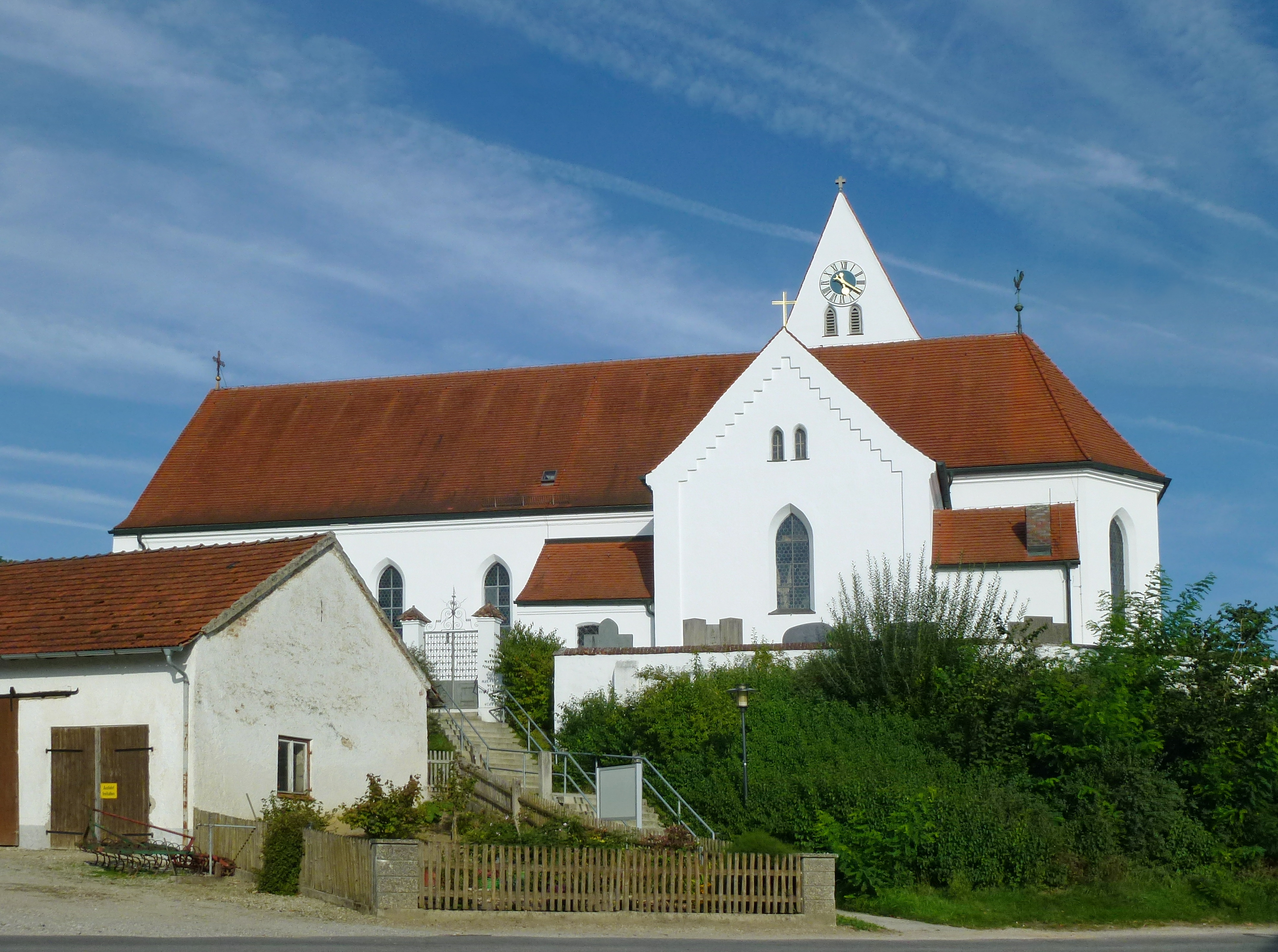 Langenpettenbach, Michelsberg 1: Katholische Pfarrkirche St. Michael. Ansicht von WSW